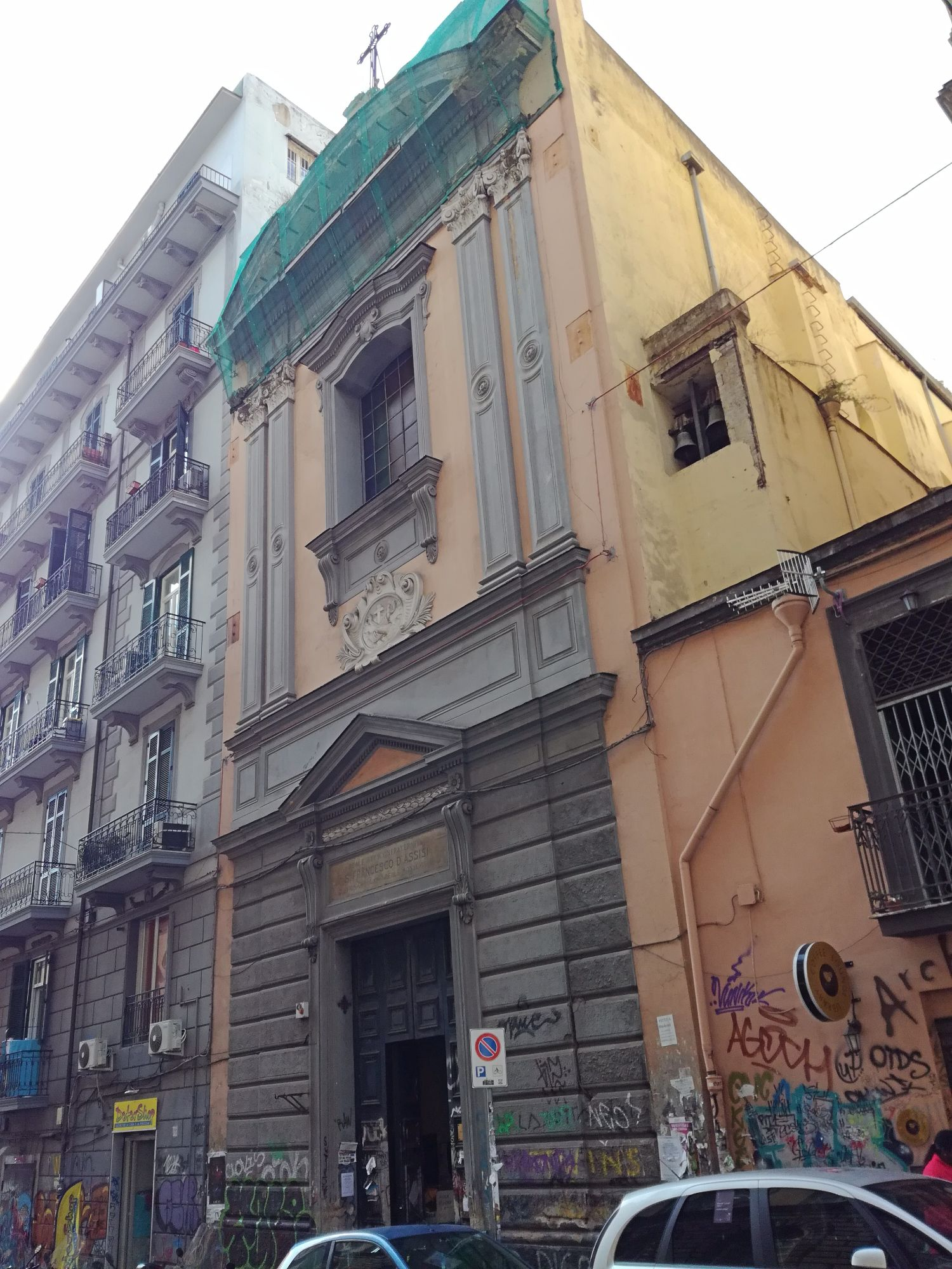 La facciata S. Girolamo delle Monache, Napoli